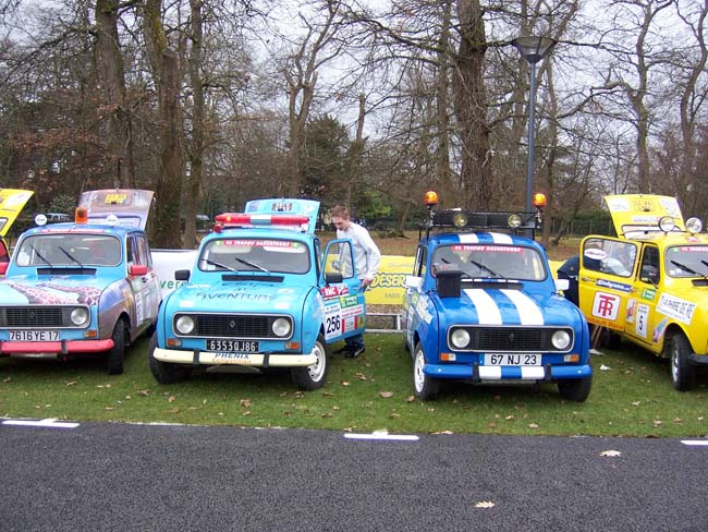 4l esip